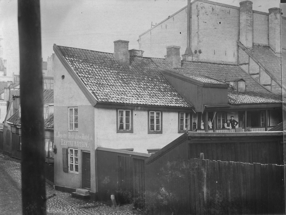 Fra Repslagergangen i Vaterland. C. Jensens Private-Hotel og Restauration, Repslagergangen 4. Bildet er en montasje av to fotografier, der dette er venstre del (A-20189/U/002/068b er høyre del). Stadsingeniøren - Fotografier af Kristiania (albumtittel). Ca 1892, basert på øvrige daterte bilder i samme album. Ukjent / Oslo Museum, ca. 1892.